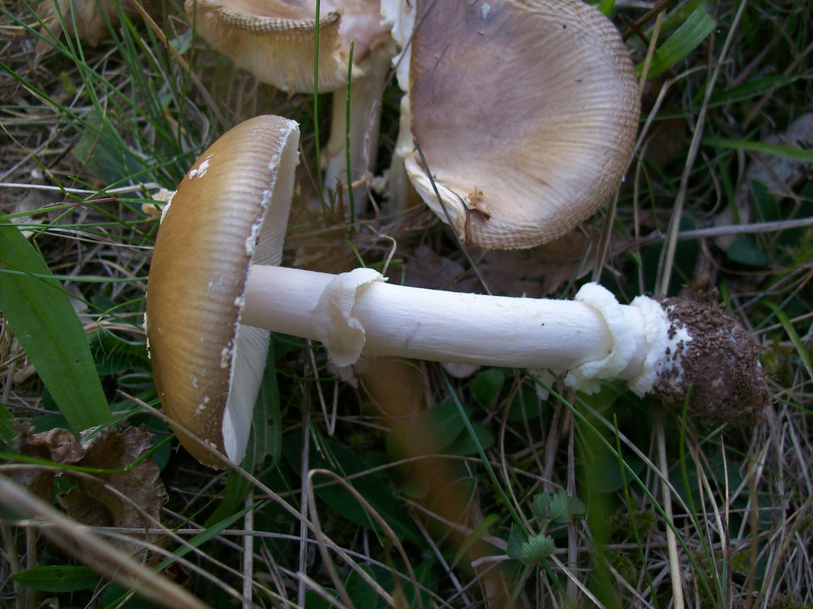 Pantherpilz mit Bergsteigersöckchen